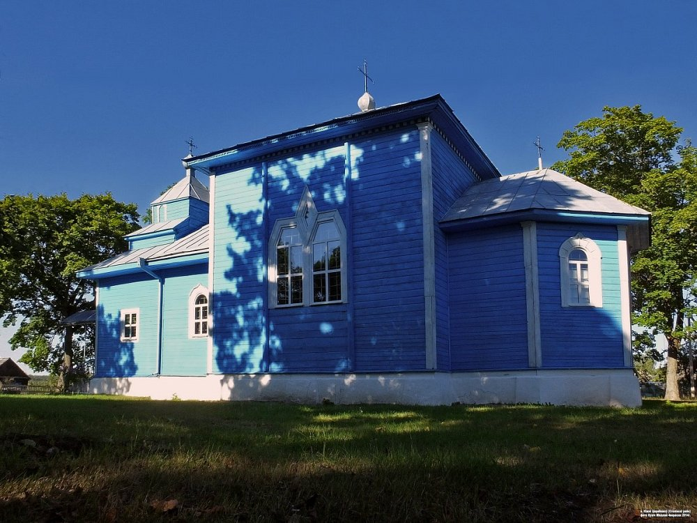 Ніжні Церабяжоў. Свята-Ільінская царква